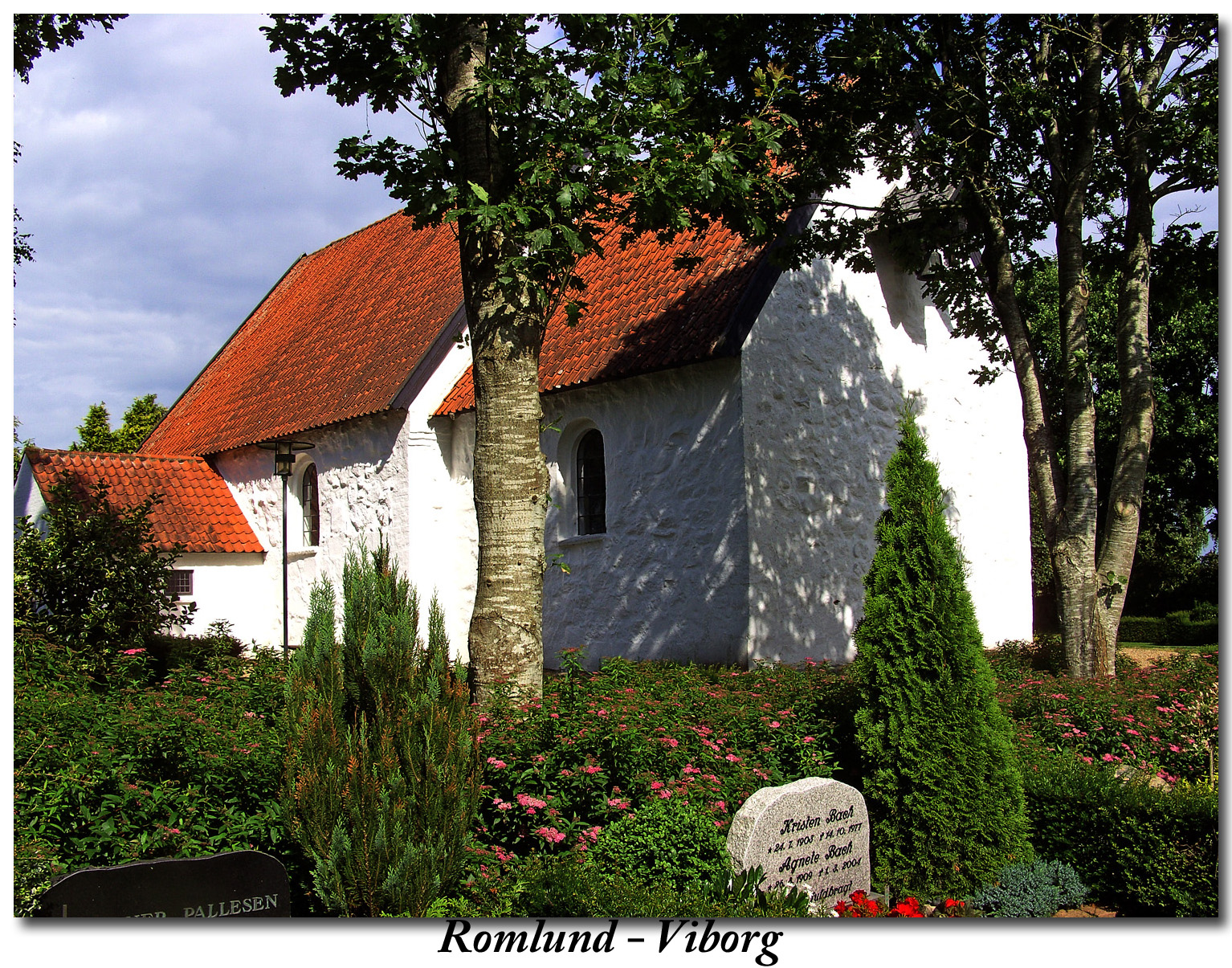 fra sydøst